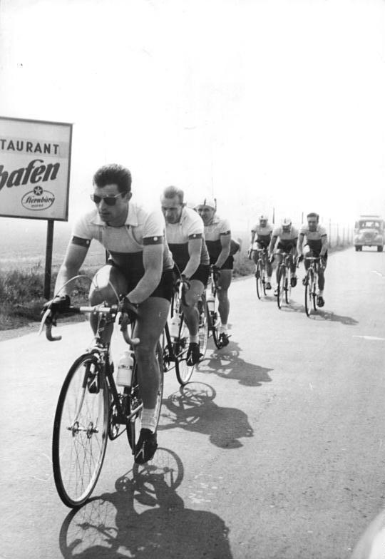 Friedensfahrt, Mannschaft der UdSSR Zentralbild Koch Won-Noa 22.4.1960 - Sowjetische Friedensfahrer trainieren im Bezirk Leipzig. UBz: Die sowjetischen Friedensfahrer beim Training.